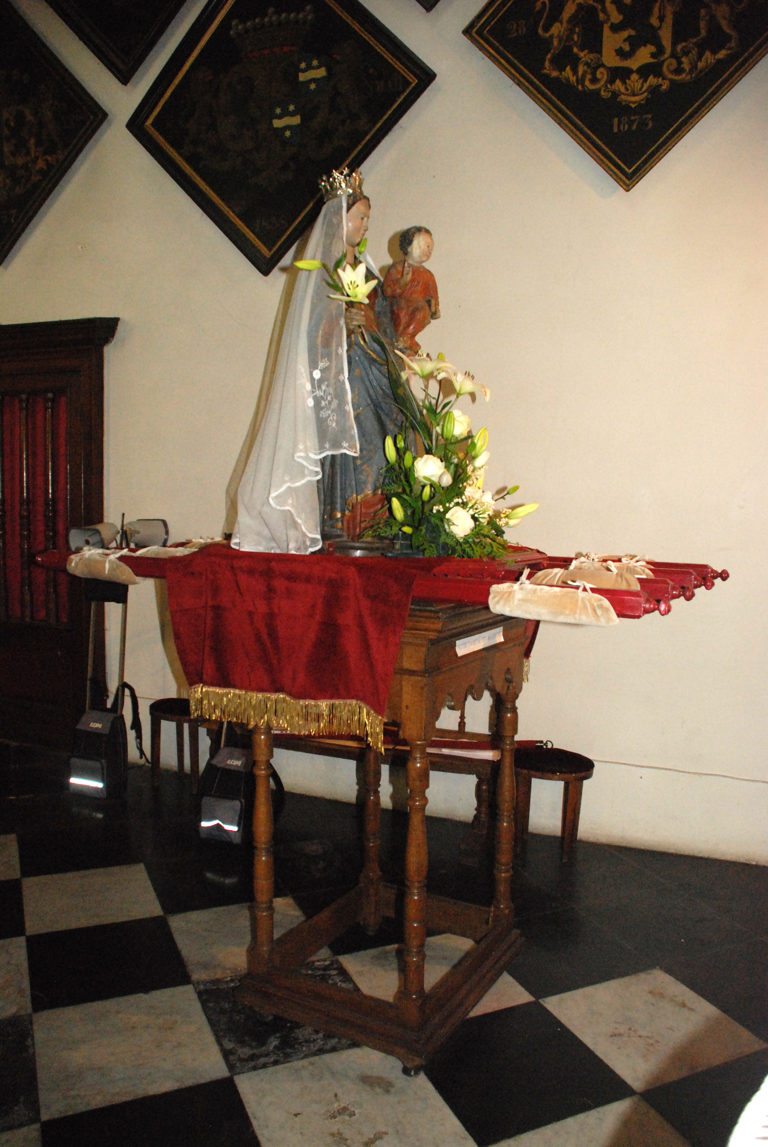 Belgique - Bousval - Chapelle du Try-au-Chêne - procession du lundi de Pentecôte